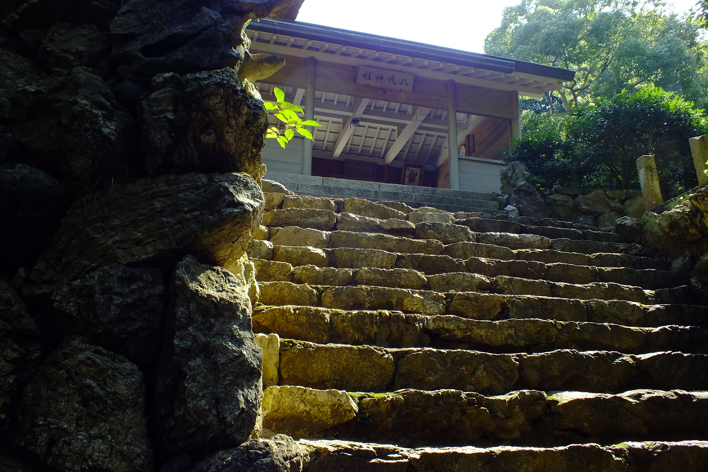 2016-08-05 Yashiro-Shrine in Kami Island (Mie)八代神社 三島由紀夫が『潮騒』に描いた八代神社